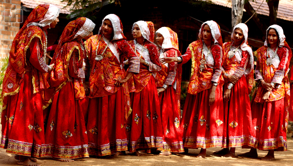 Folk dance of Gujarat India